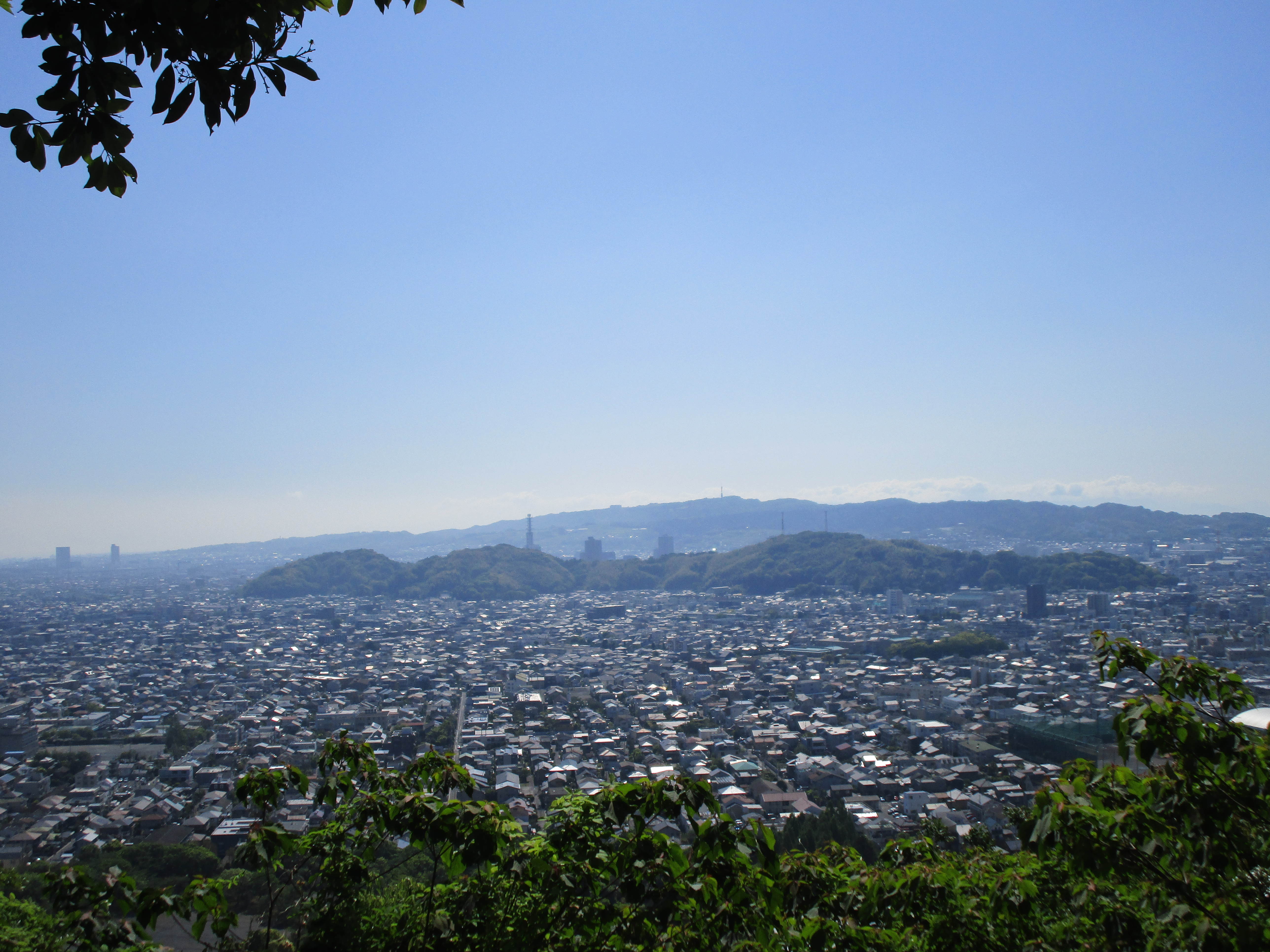 賎機山ハイキング